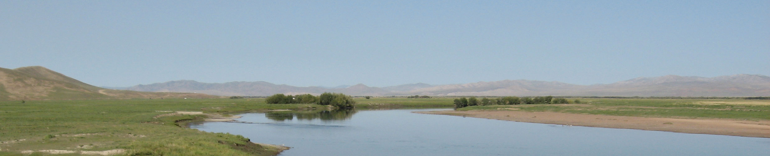 Delgermörön river near Mörön, Khövsgöl, Mongolia